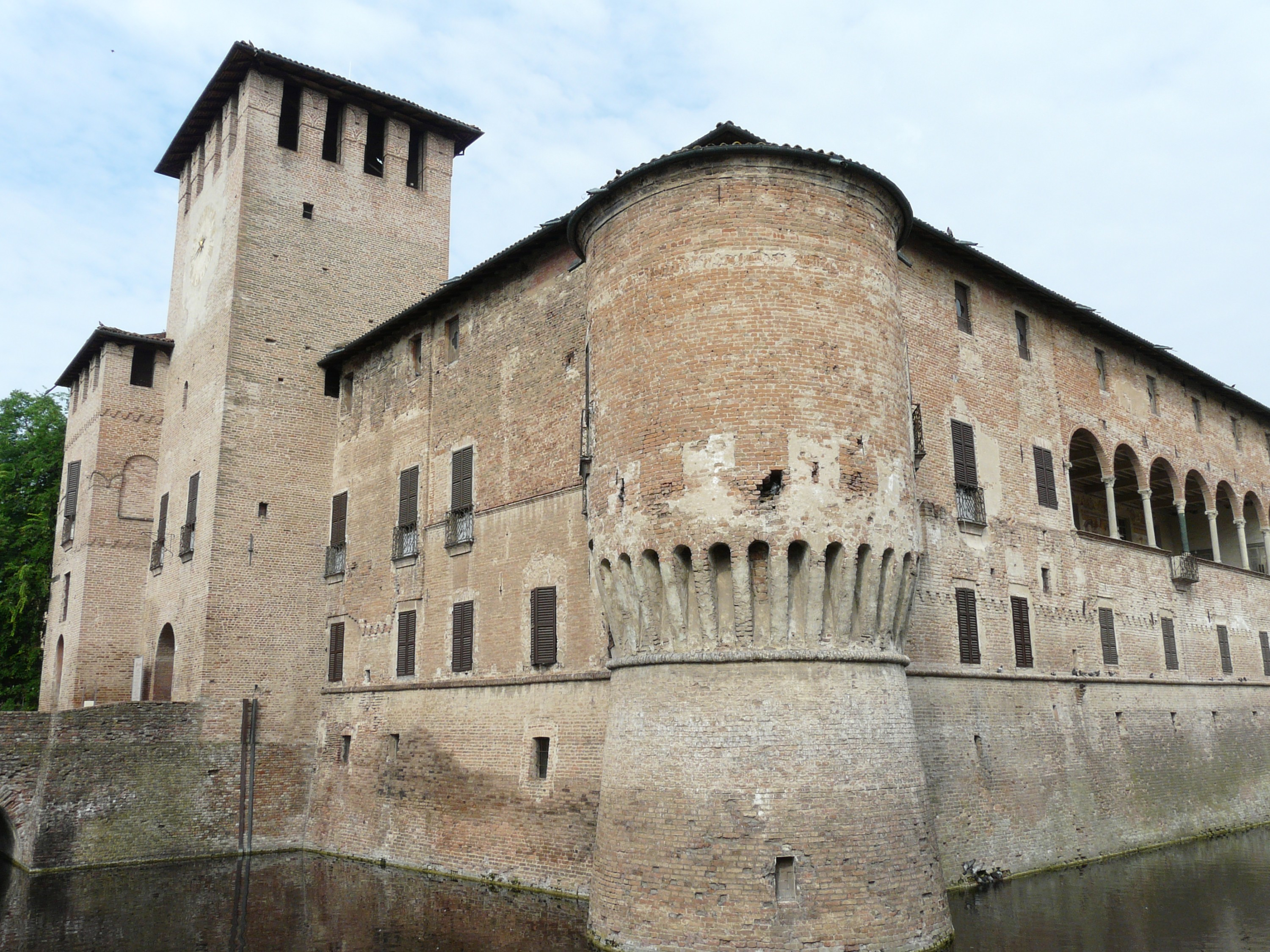 Immagini della Rocca Sanvitale di Fontanellato, Emilia-Romagna, Italia